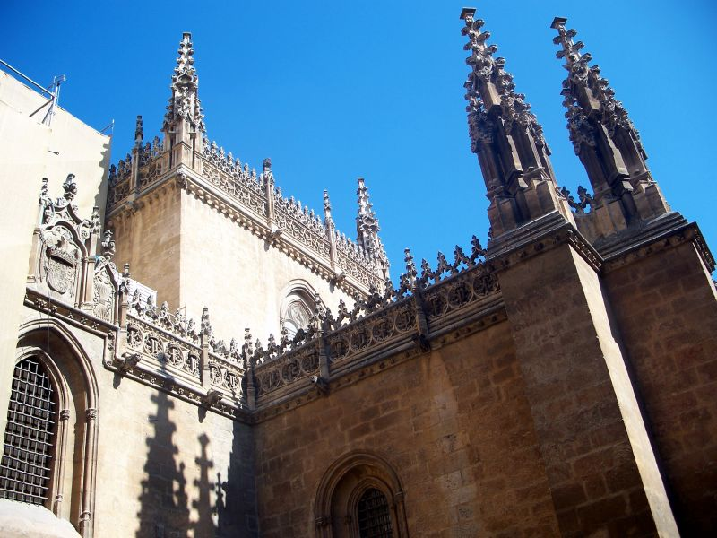 Capilla Real de Granada